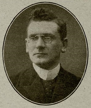 Tjeerd Hoekstra (1880-1936). Foto door A.C. Verhees (1859-1929).